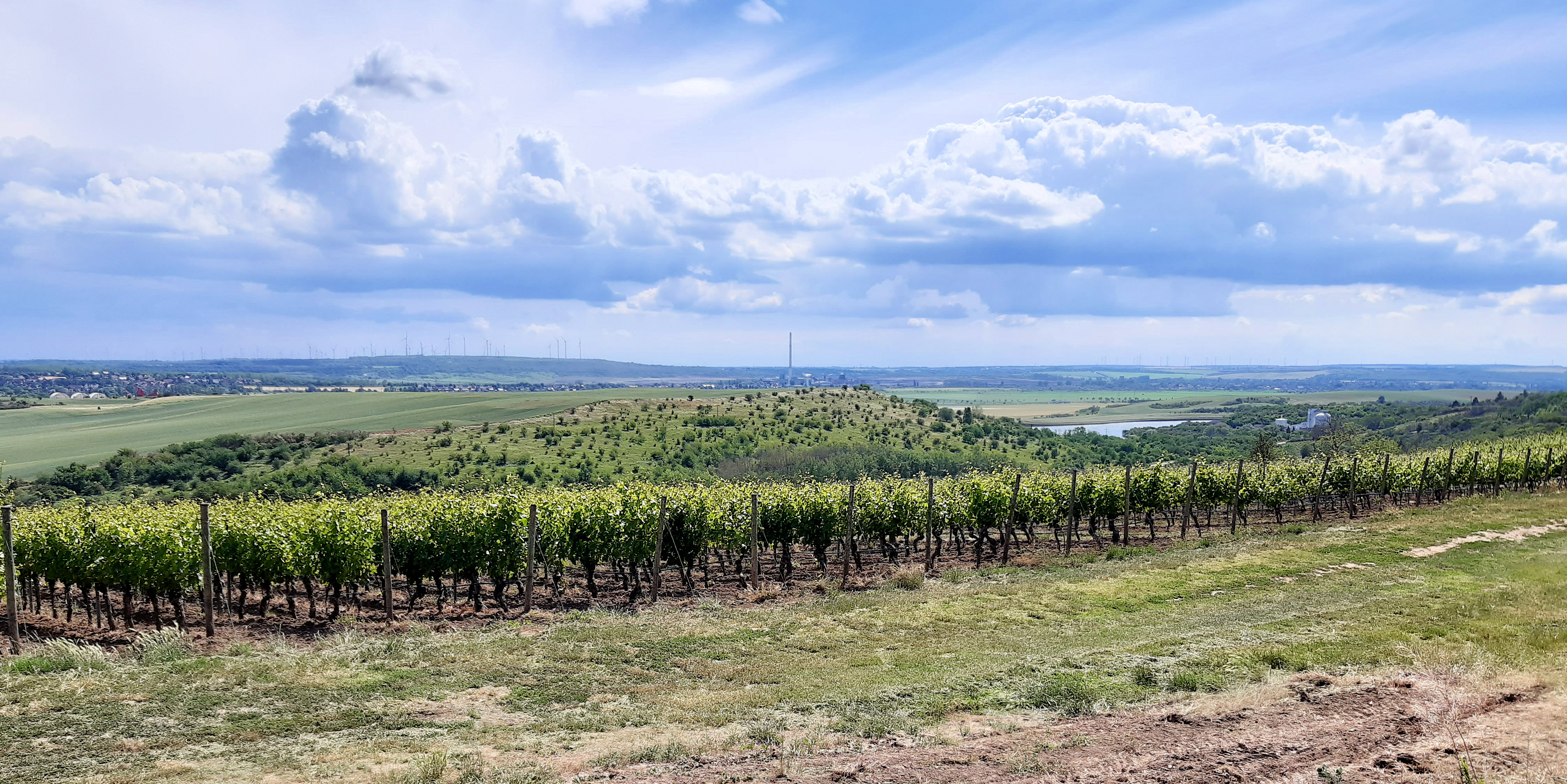 Weinbaugebiet Mansfelder Seen, zwischen Höhnstedt und Langenbogen, Blick zum Kerner See